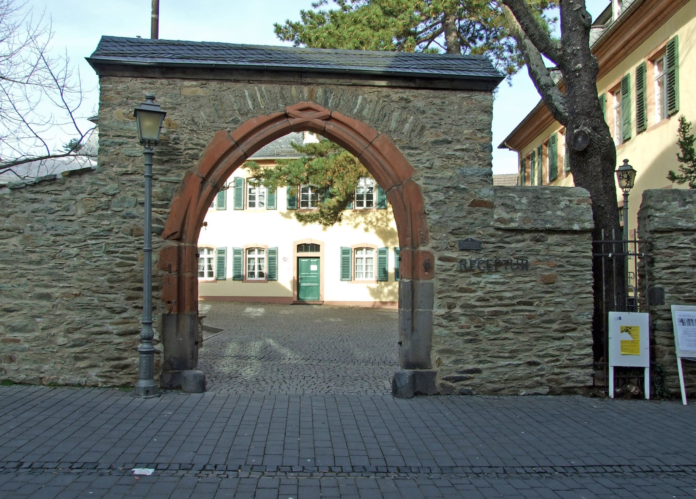 „Receptur“ in Kronberg